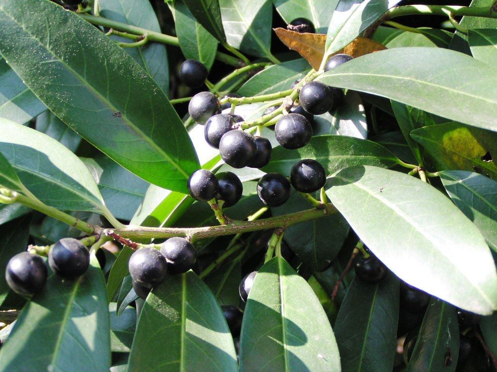 Lorbeerkirschen